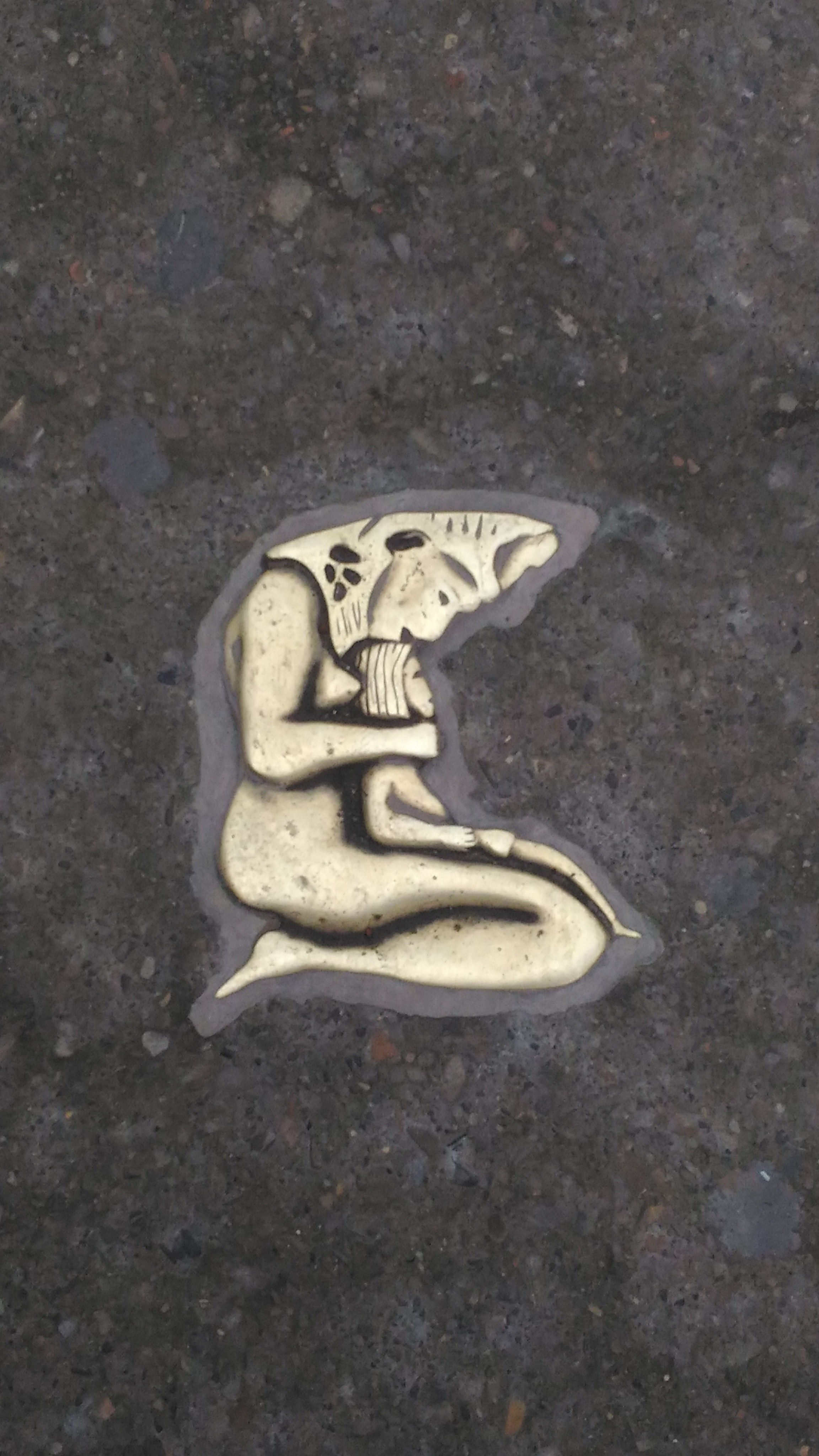 A deusa Chía nas rúas da localidade de Chía.